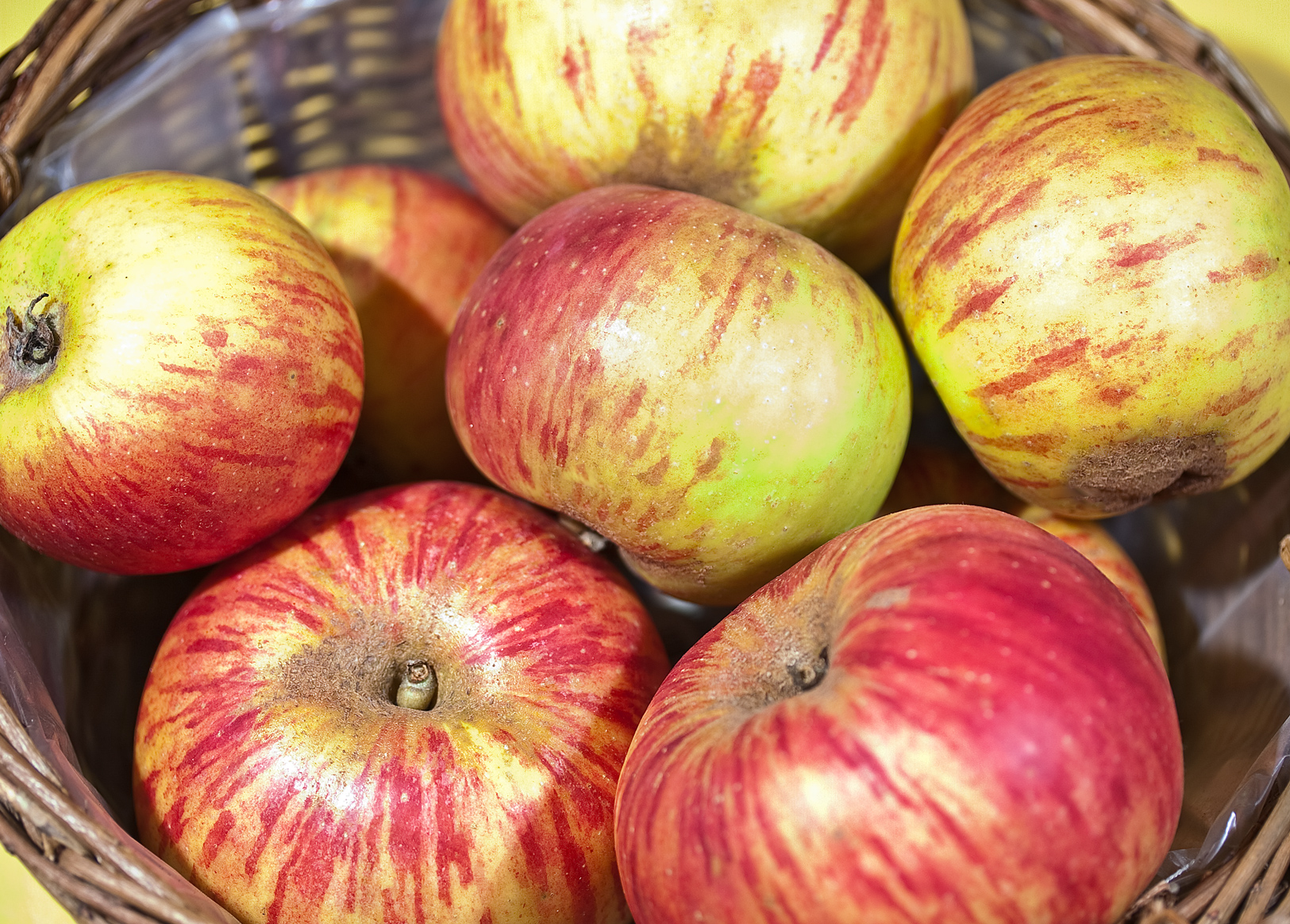 Der Jakob Lebel ist eine Apfelsorte